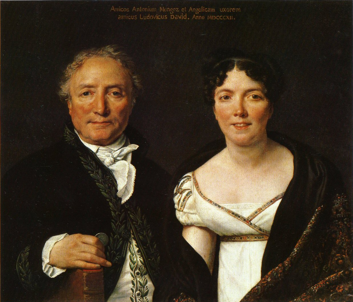 Portrait d'Antoine Mongez et de sa femme Angélique (1812), musée du Louvre Paris